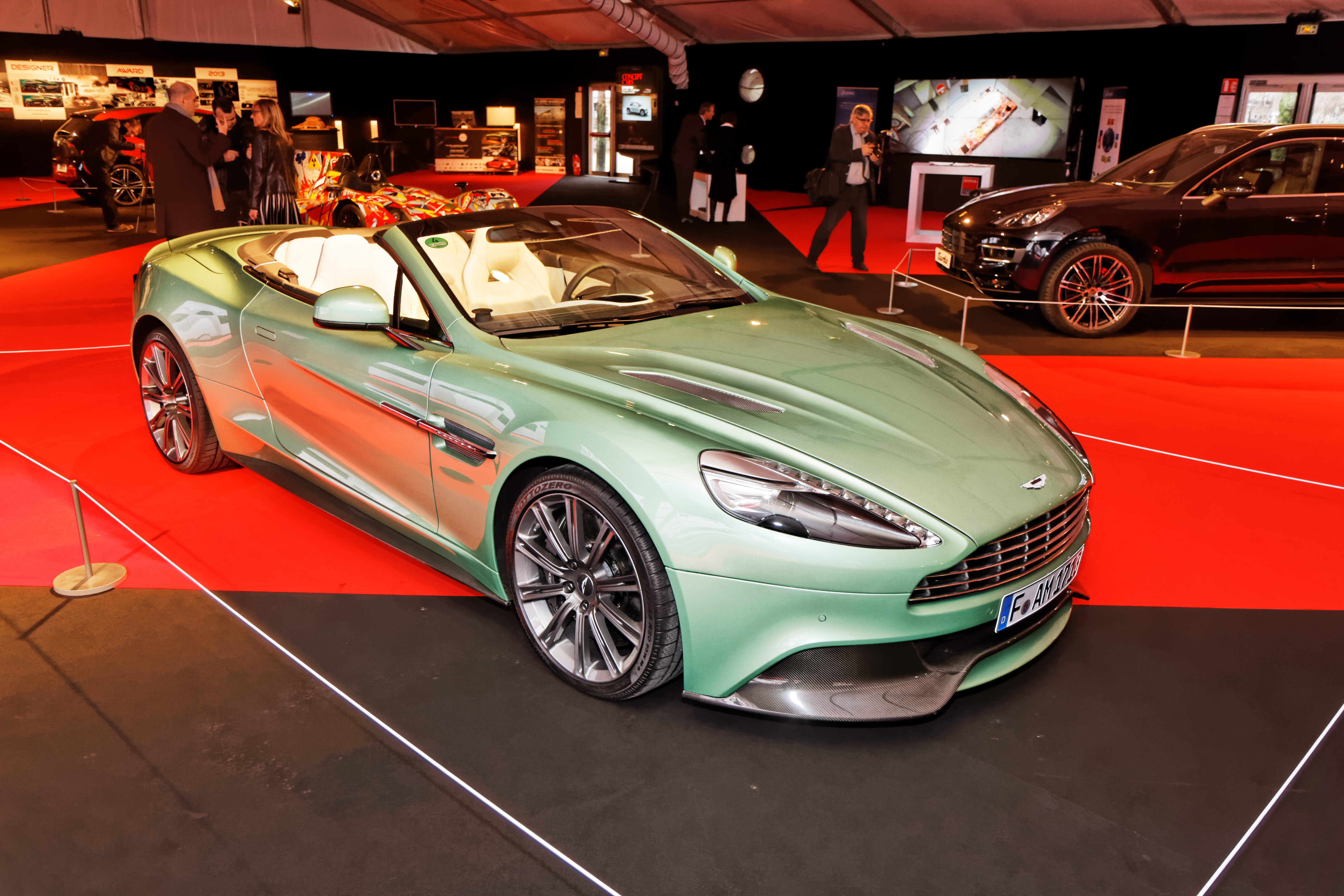 L'Aston Martin Vanquish Volante exposée lors du festival automobile international 2014.